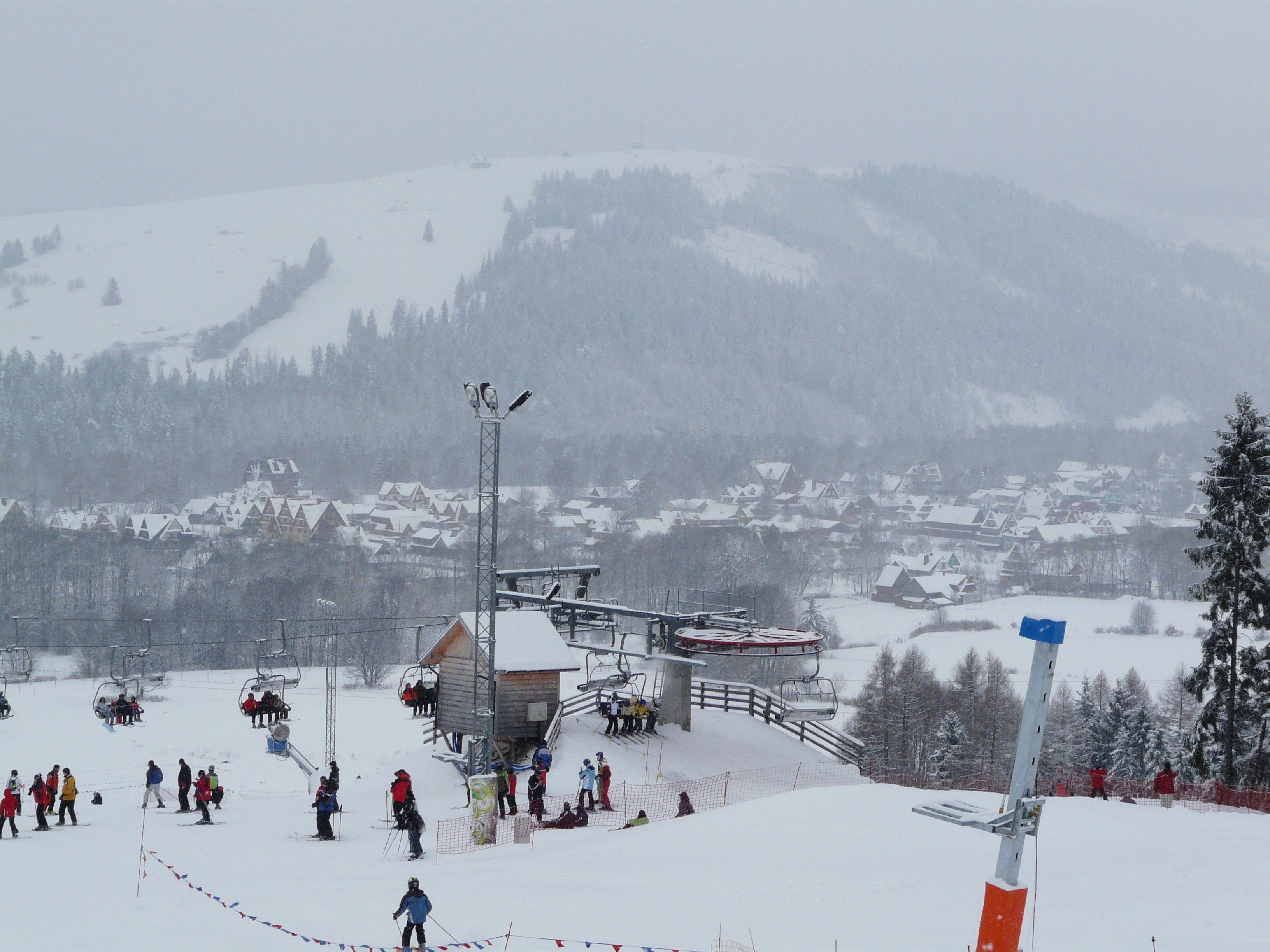 Białka Tatrzańska wyciąg, maszt komórkowy